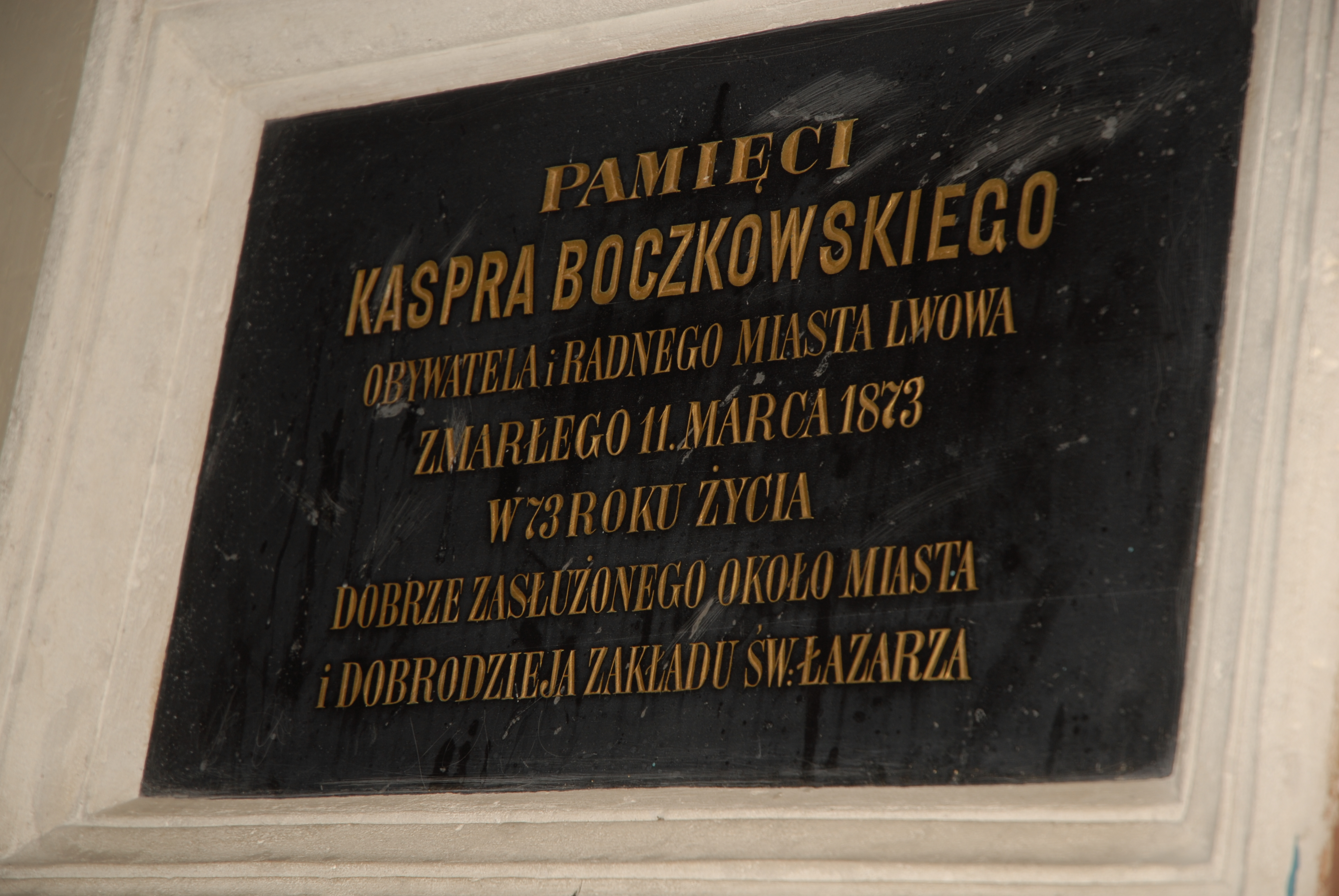 Lwów-kościół św.Łazarza-tablica pamiątkowa Kaspra Boczkowskiego